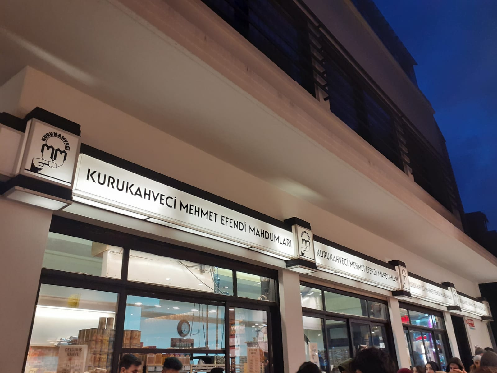 Emiinönü Kurukahveci Mehmet Efendi Mahdumları